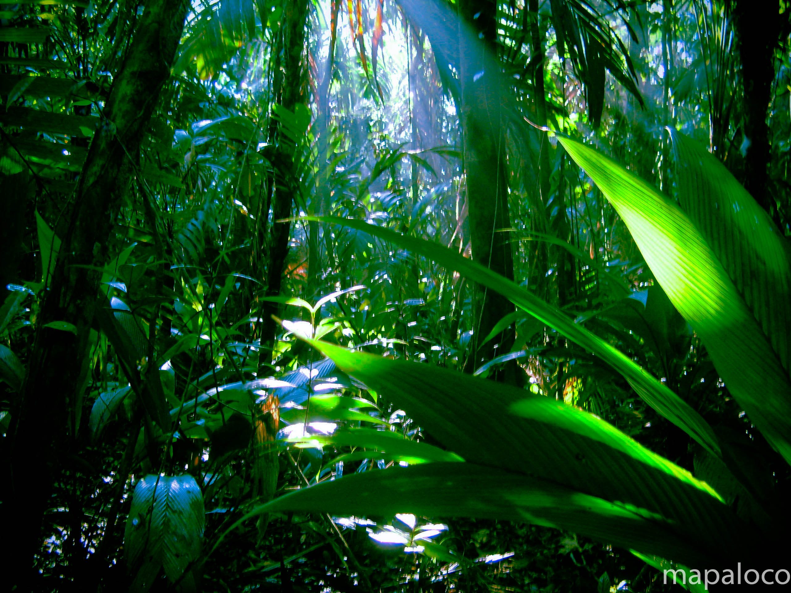 Bosque en la finca Susun, Comunidad San Martin Yaoya, Prinzapolka, RAAN, Nic.